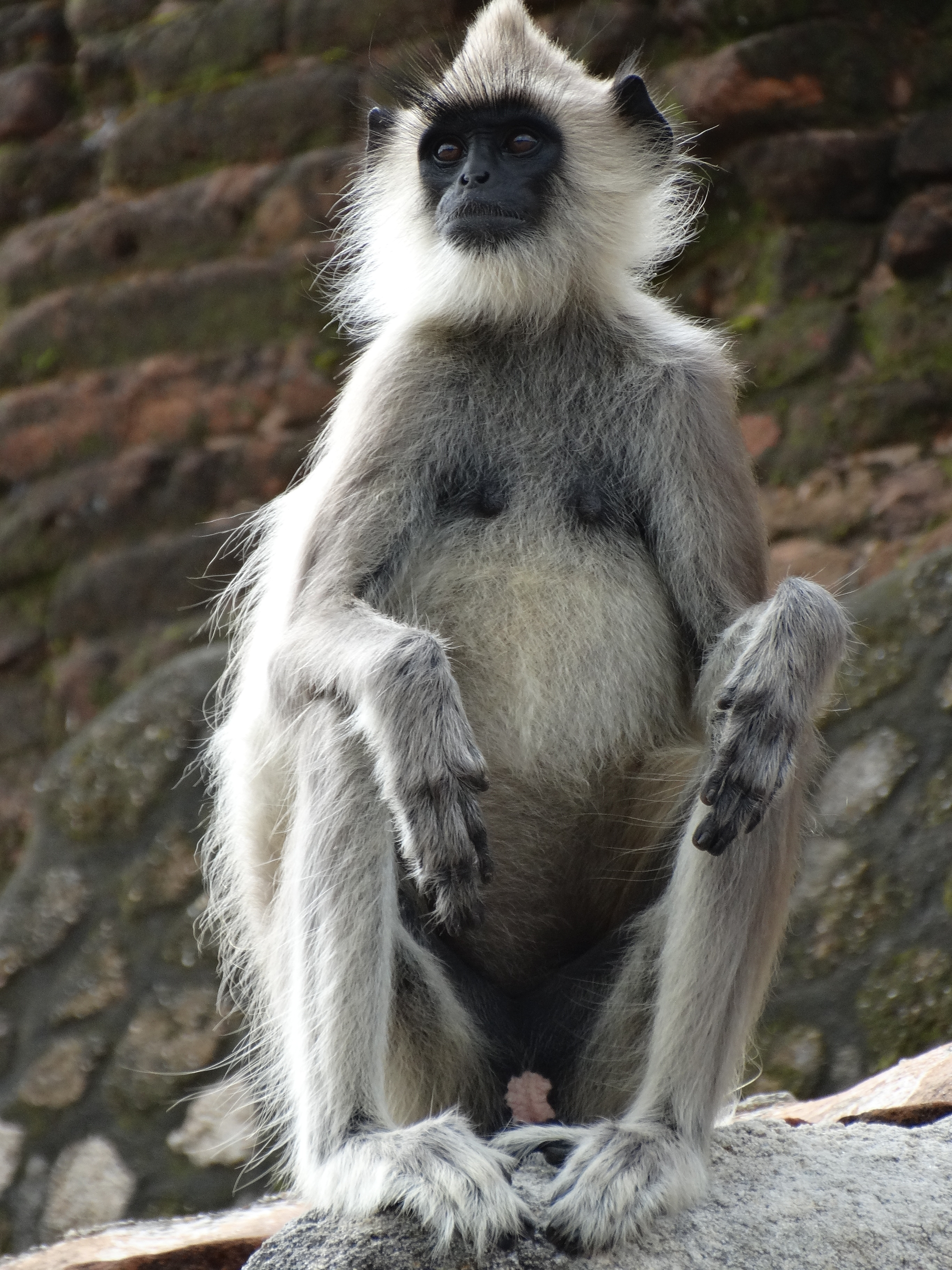 Monkey at Jetavanarama Dagoba - Anuradhapura - Sri Lanka - 01